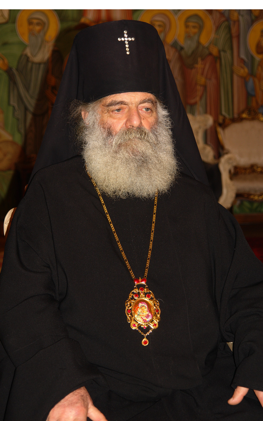 Николай (Пачуашвили)